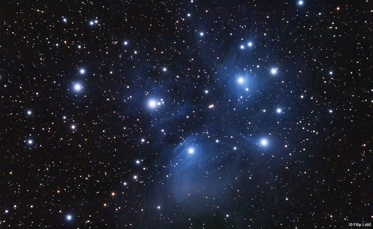 Messier 45 Open cluster